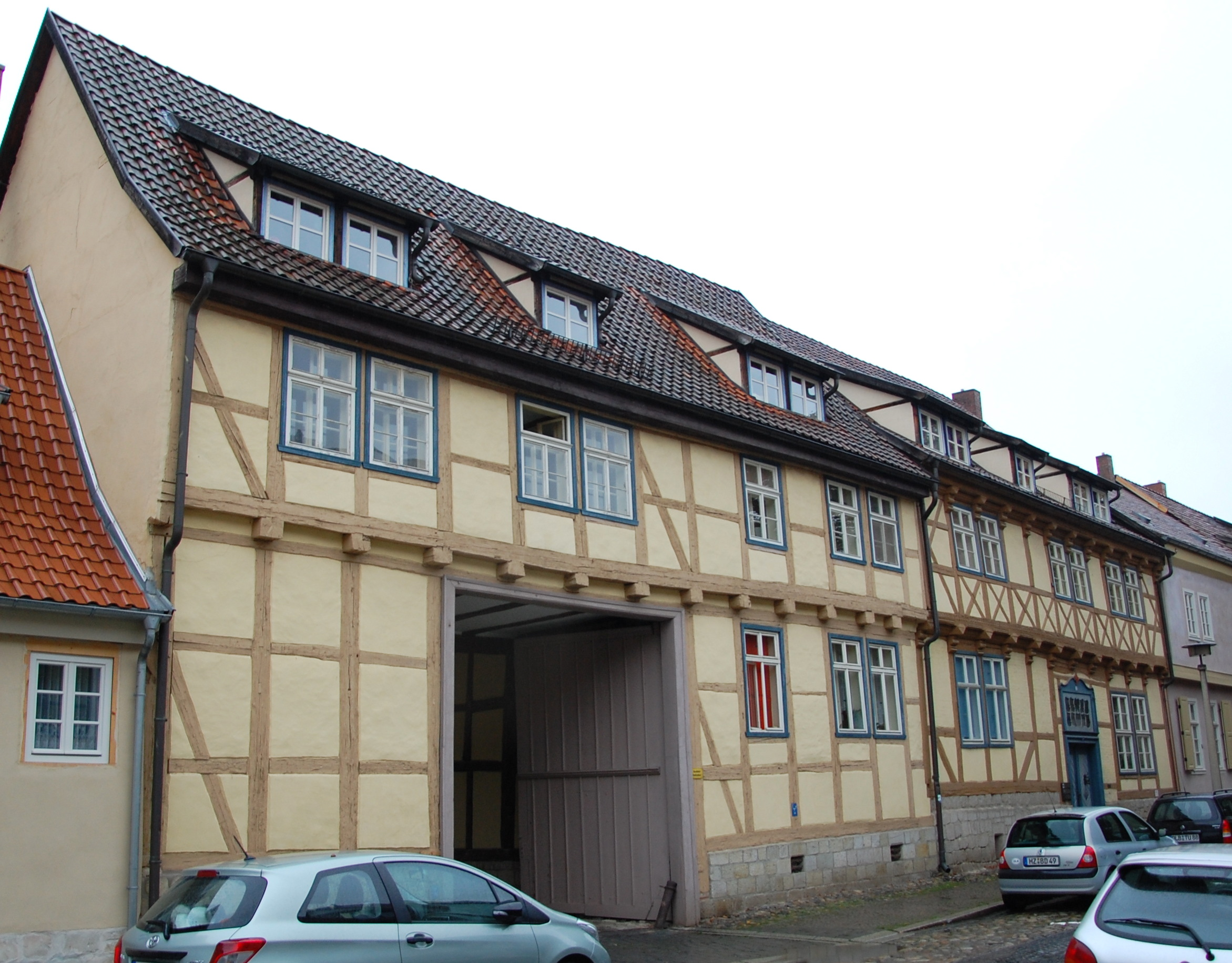 Haus Kaiserstraße 36 in Quedlinburg